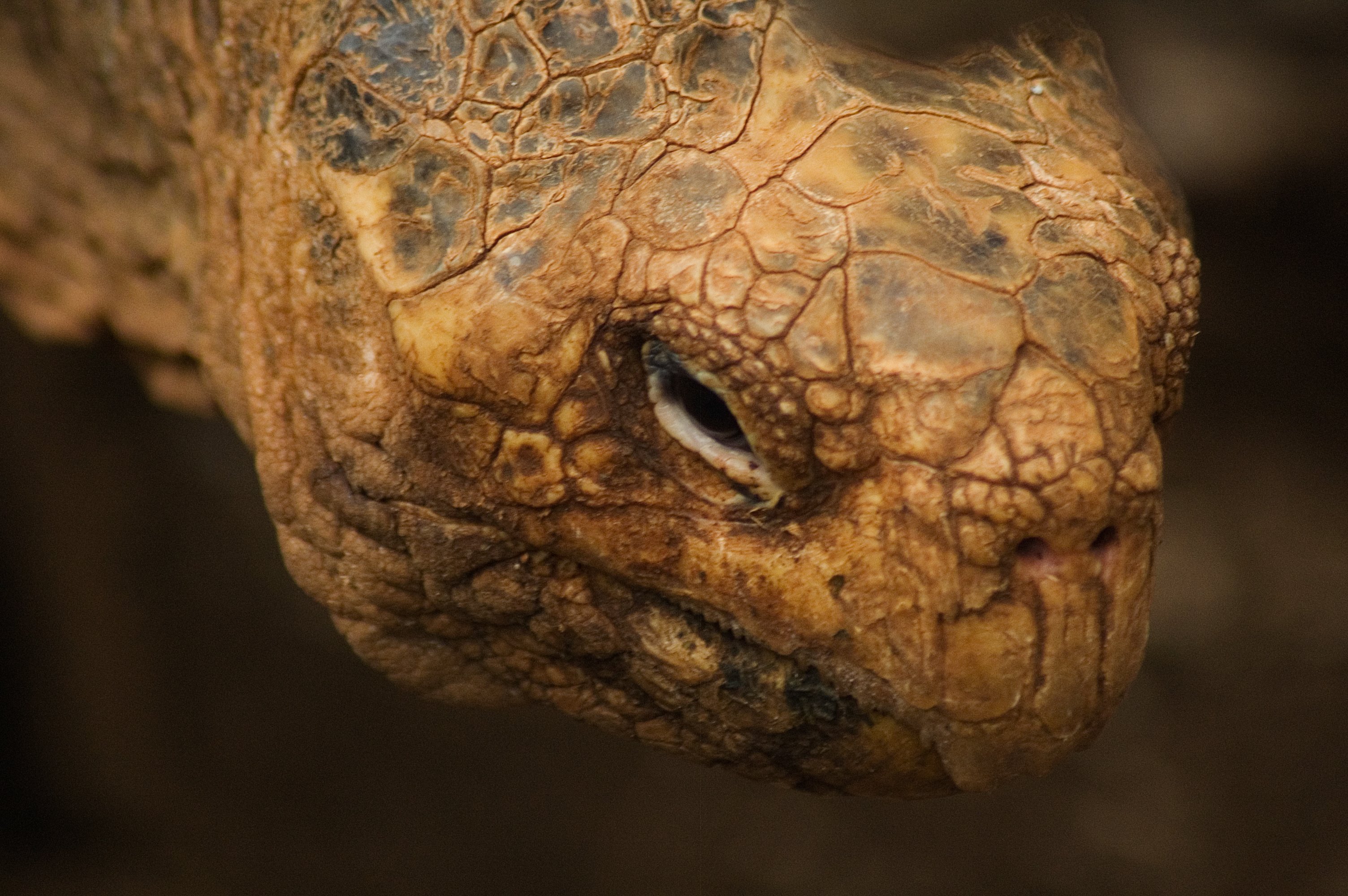 Diego